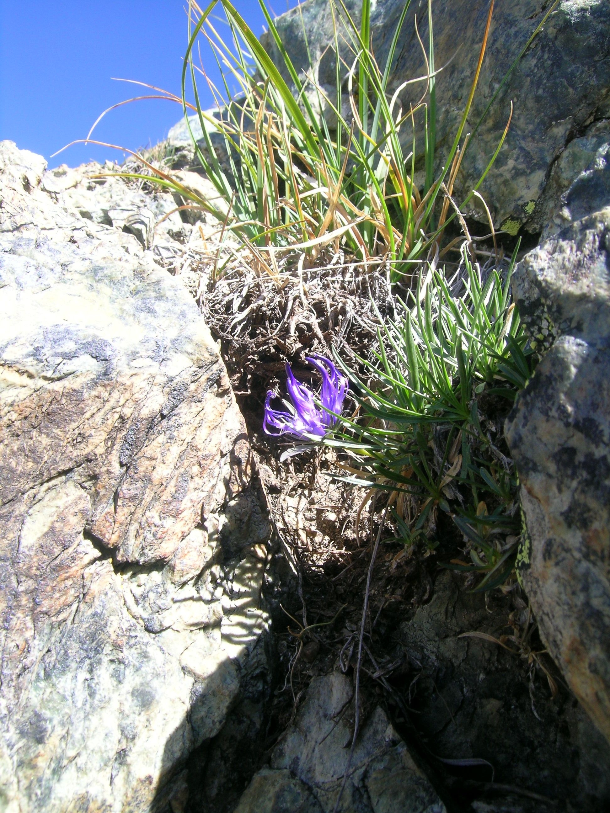 Phyteuma humile, Gornergrat, Gagenhaupt, Riffelberg, Zermatt, Kanton Wallis, Schweiz (2650 m.a.s)